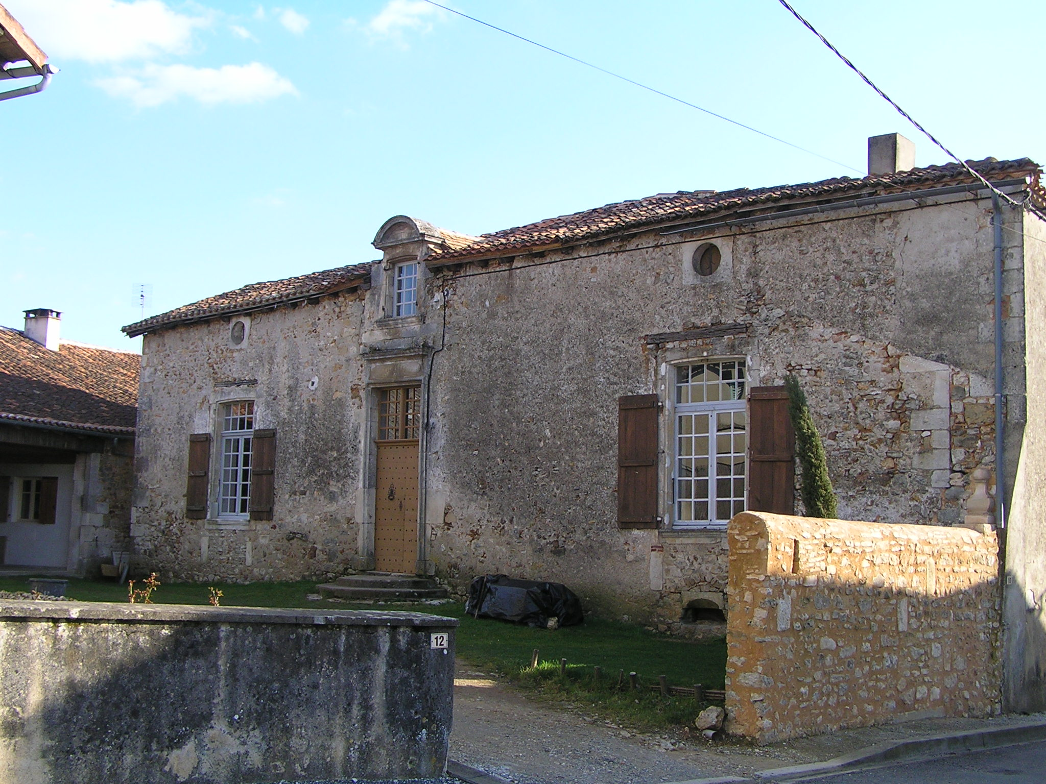 maison ancienne à Saint-Sornin (Charente)